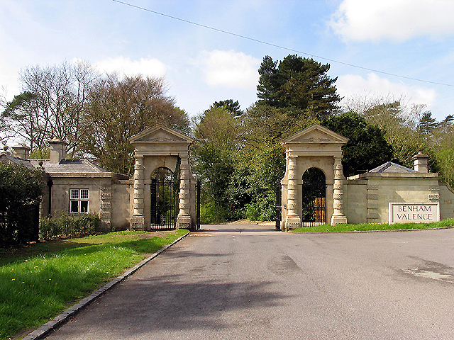 Gates to Benham Valence